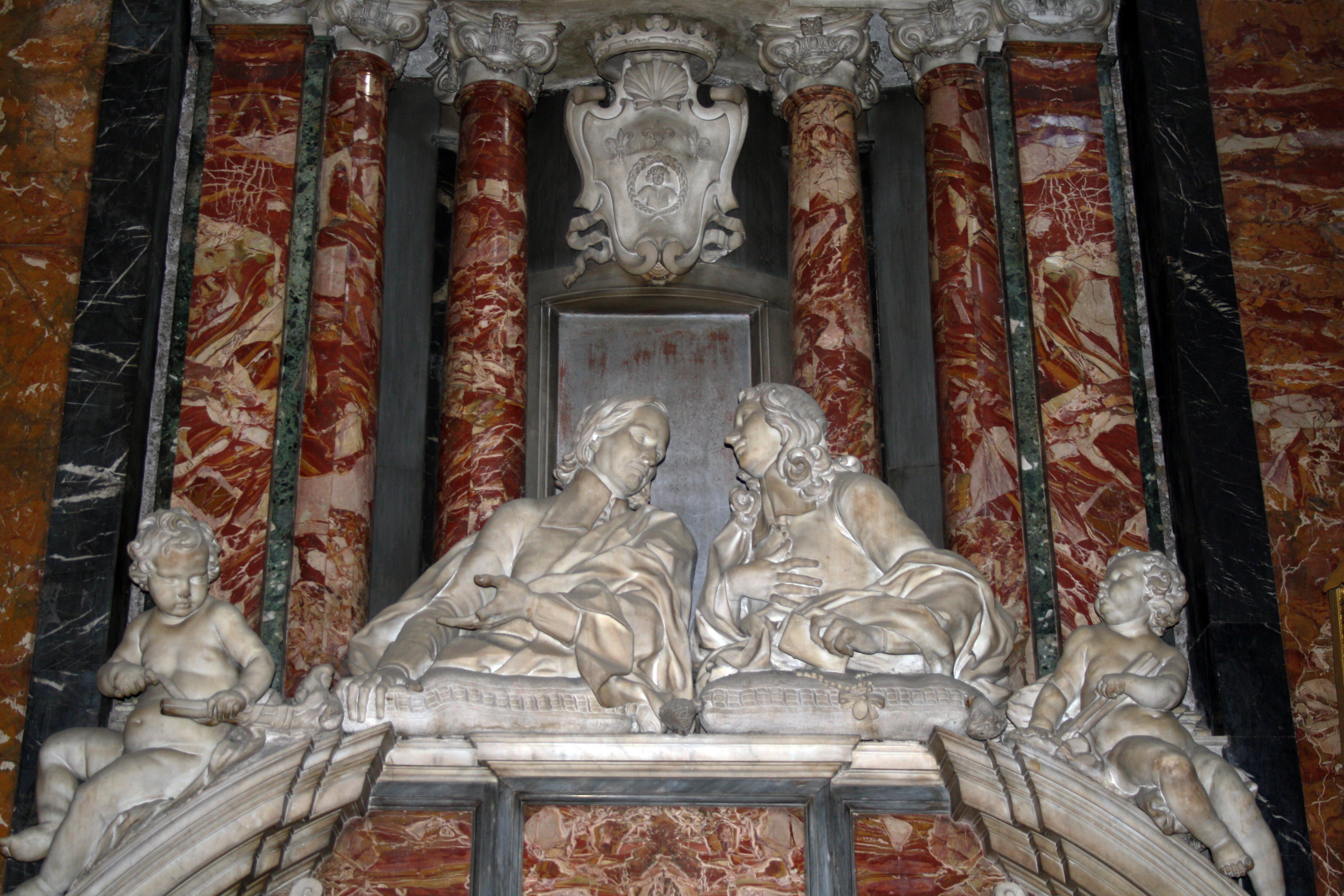 Francesco Aprile – Monumento funebre dei Pietro e Francesco Bolognetti, Chiesa di Gesù e Maria, Roma